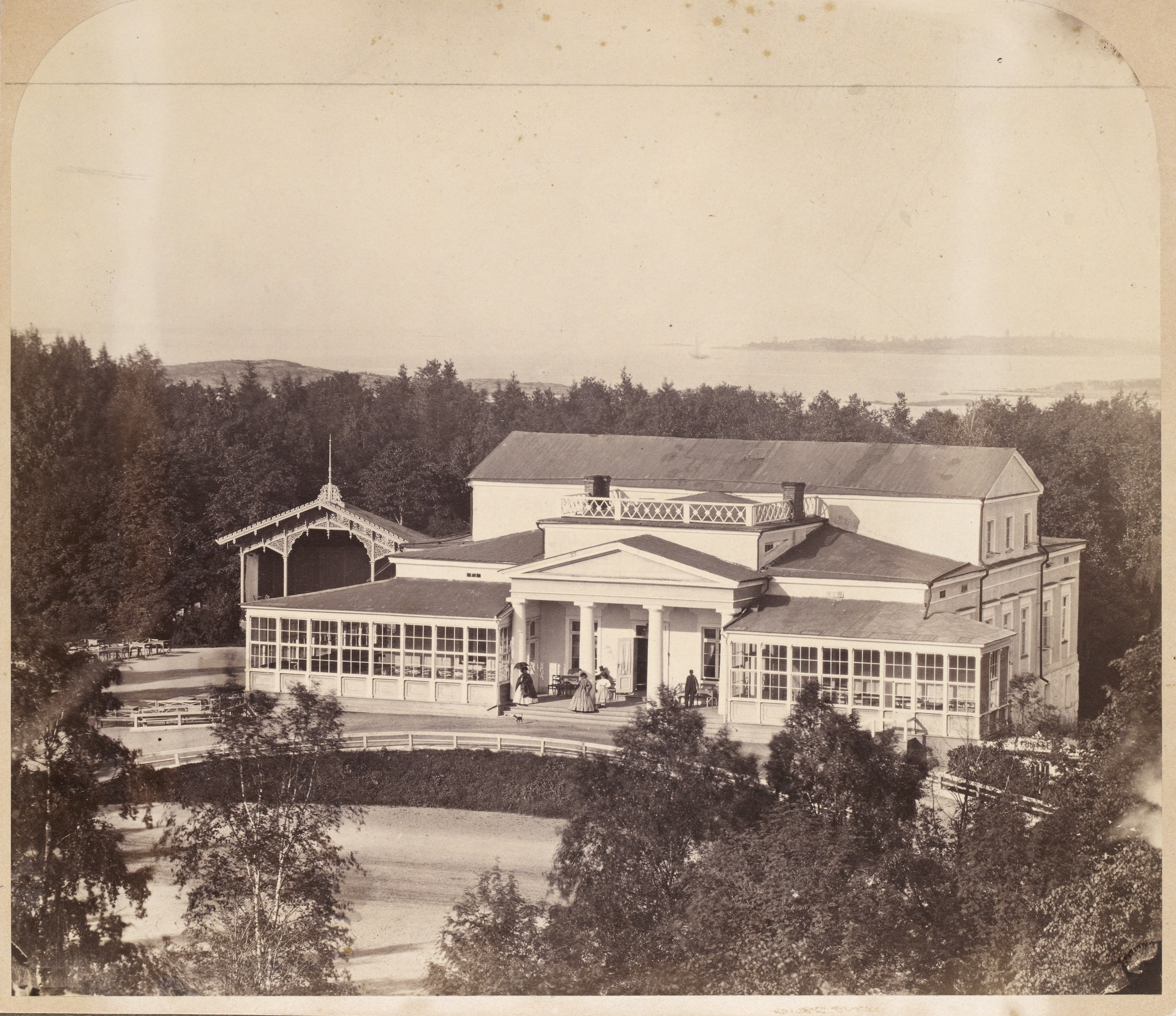 Ullanlinnan kaivohuone. vaaka, mustavalkoinen